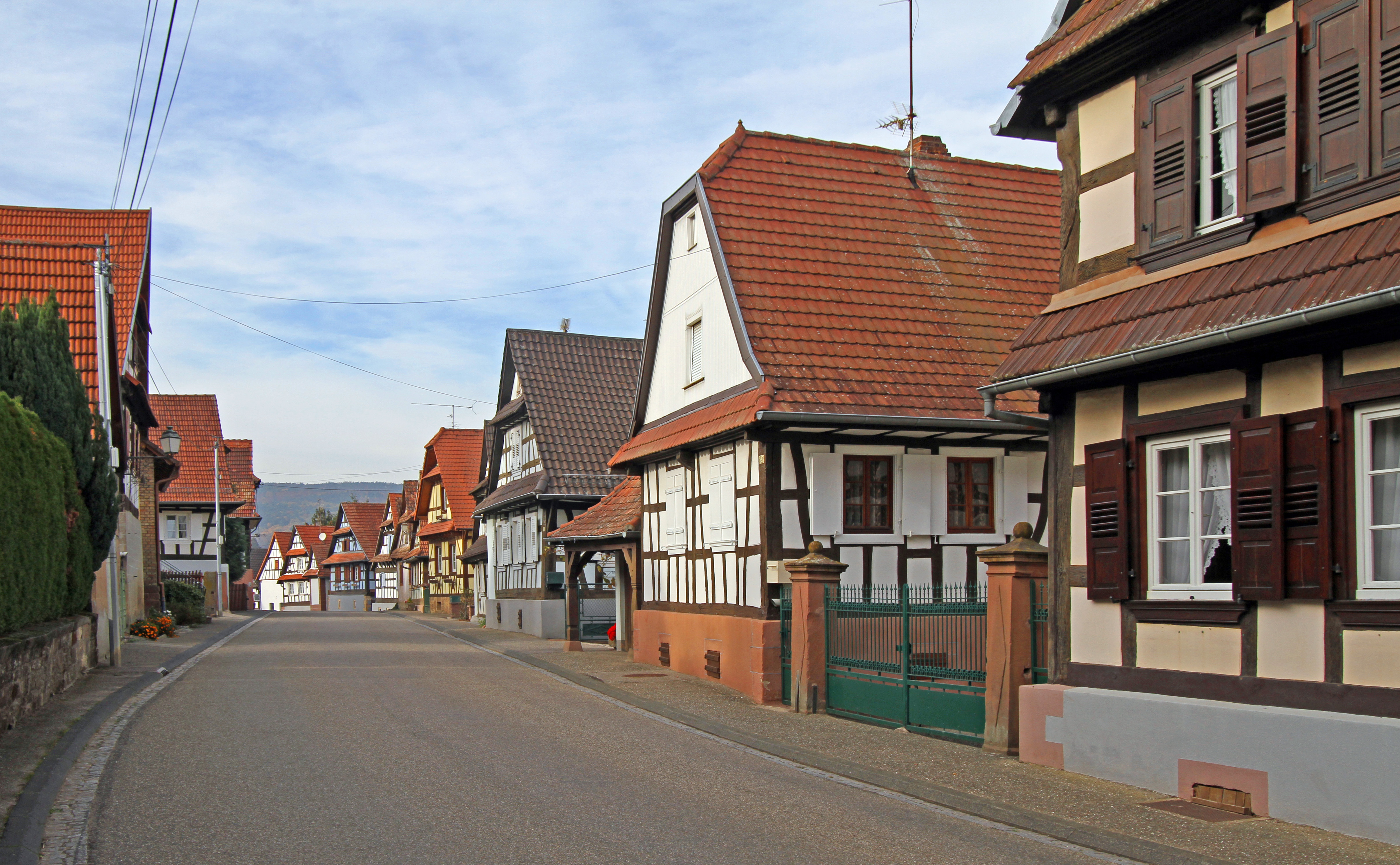 Steinseltz